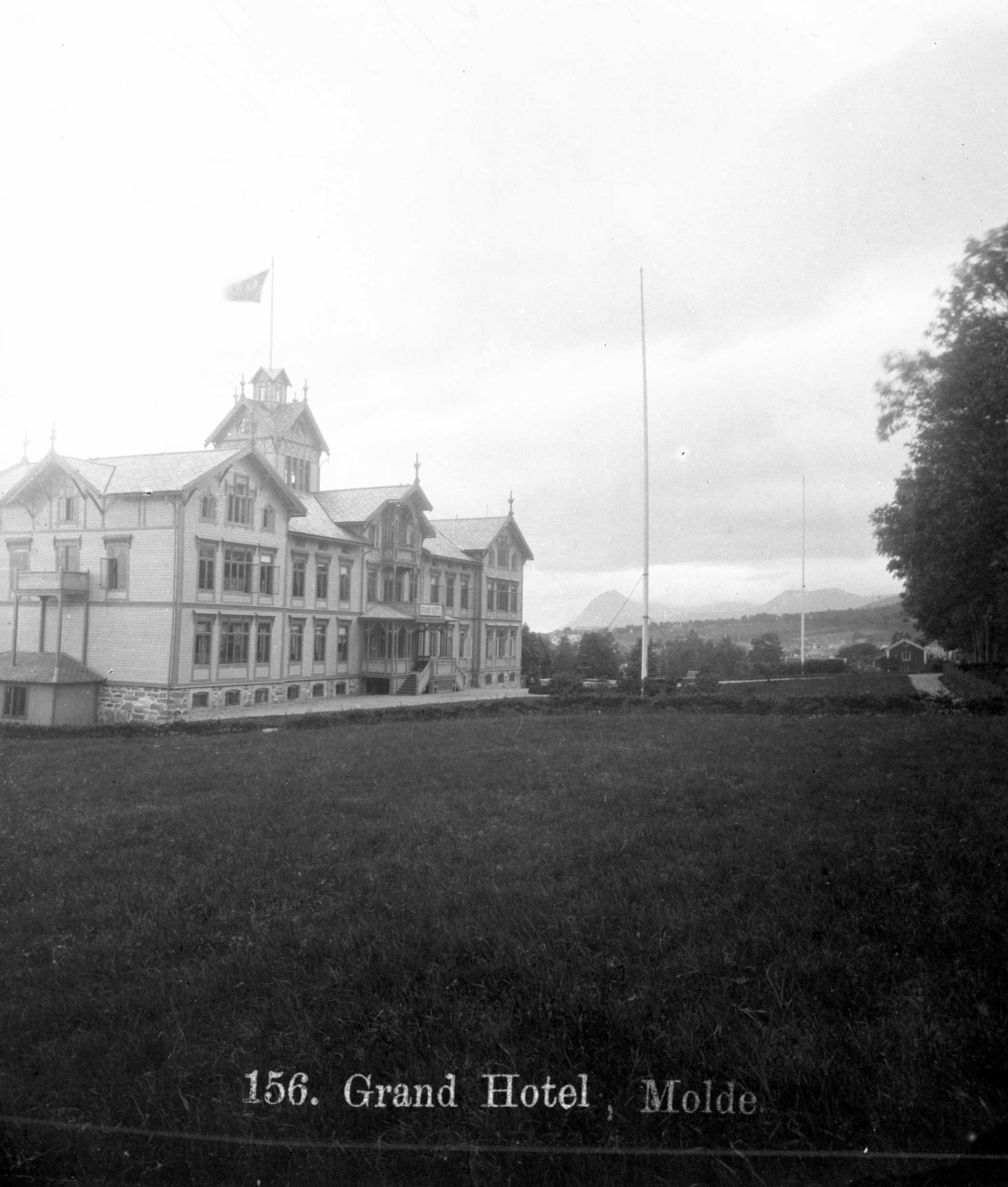 Grand Hotel, Molde.